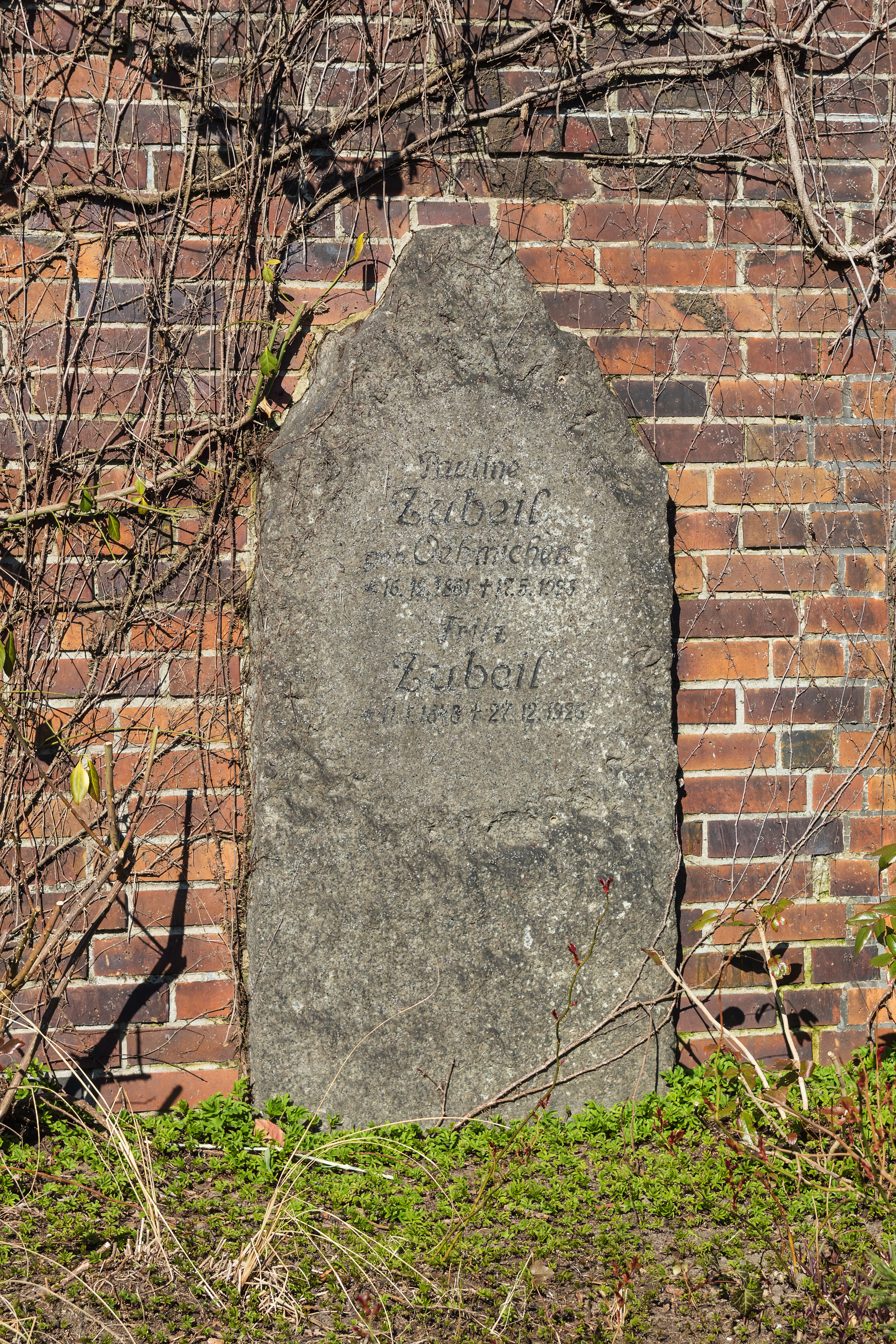 Zentralfriedhof Friedrichsfelde, Berlin-Lichtenberg. Gedenkstätte der Sozialisten, Grab von Fritz und Pauline Zubeil.